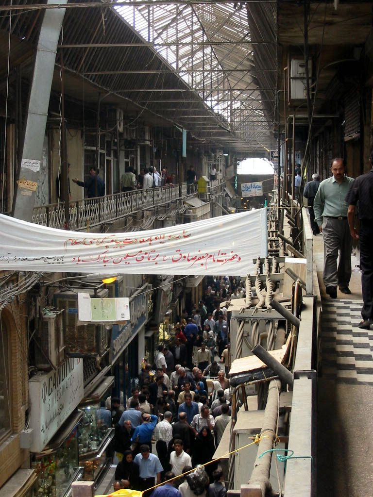 Grand Bazaar in Tehran, Iran